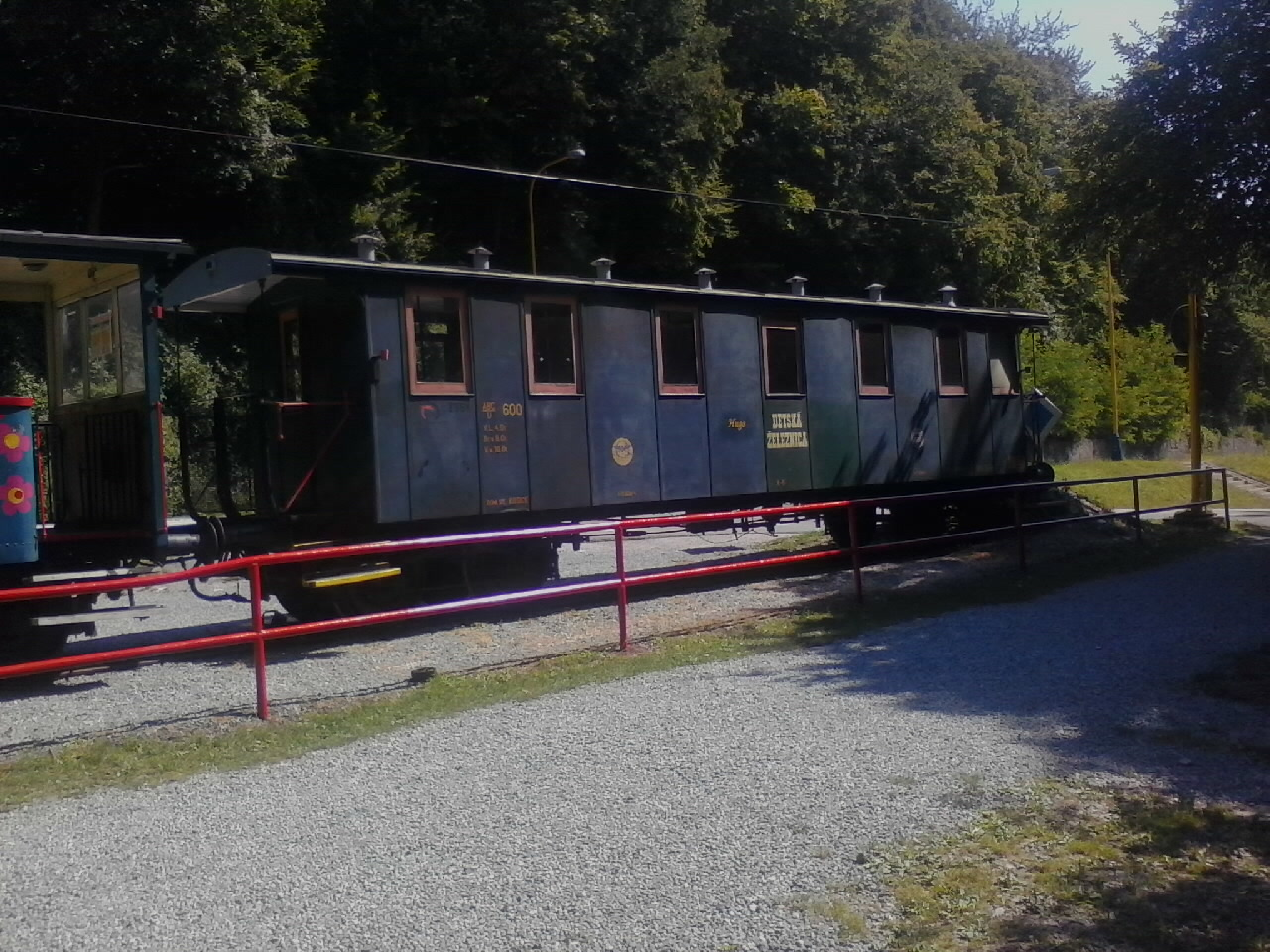 Krytý osobný vozeň ABC/u 600 odstavný na konci trate v Čermeli.